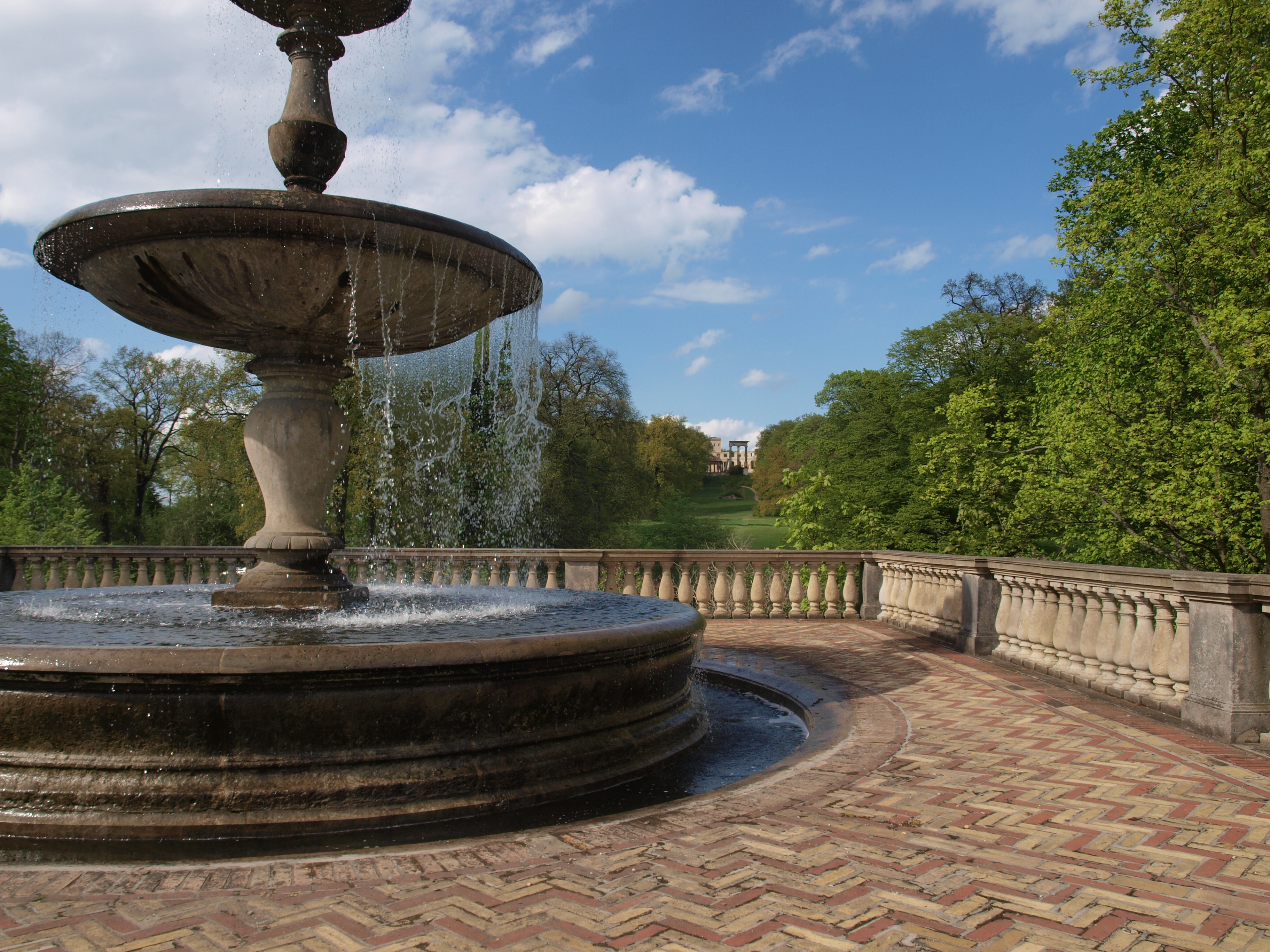 Pferdetränke in Sanssouci mit Ruinenberg